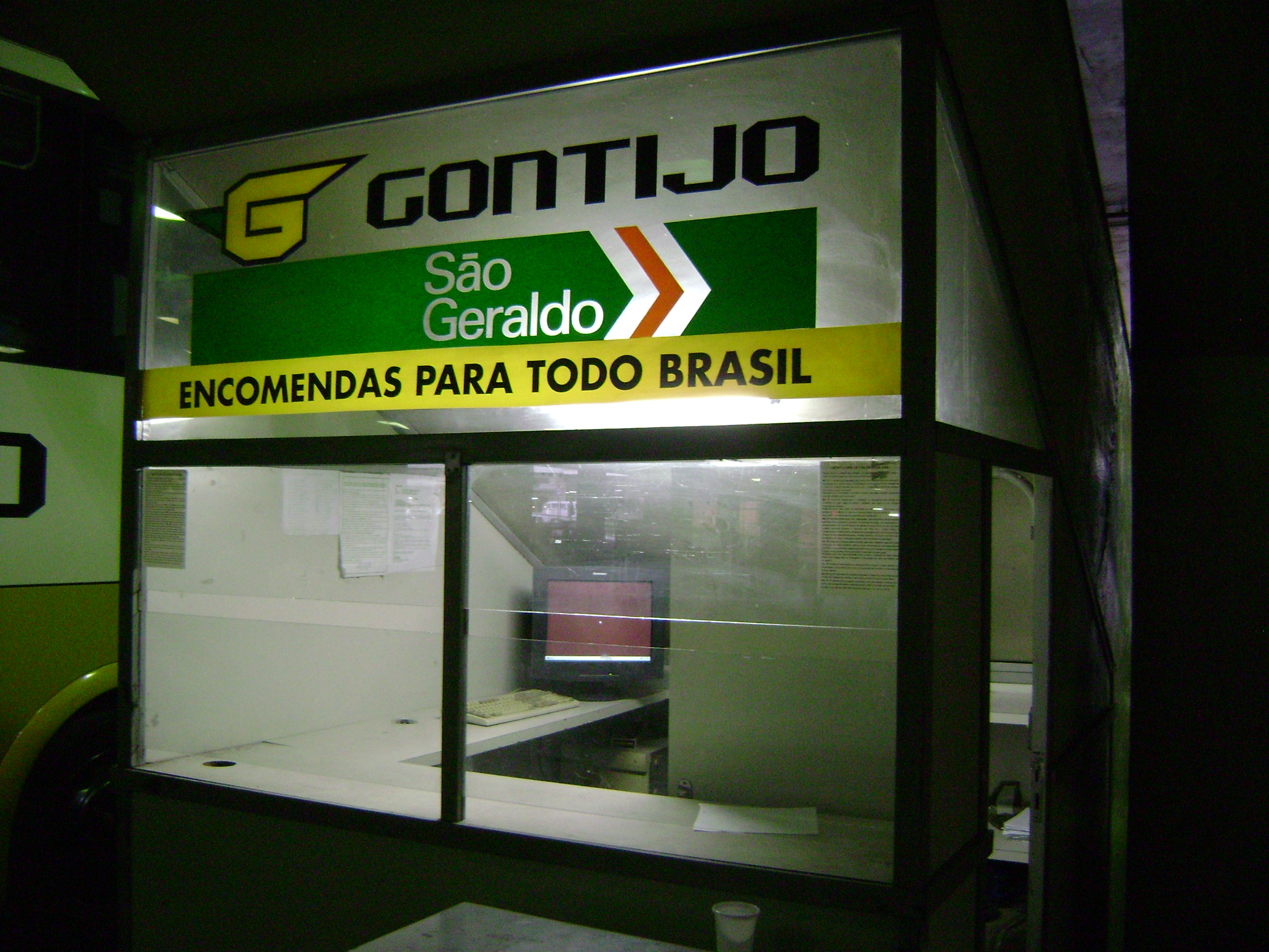 Cabine da Gontijo no terminal rodoviário de Belo Horizonte, em Minas Gerais, Brasil.